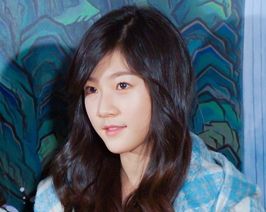 140227 '만수' VIP 시사회 김새론